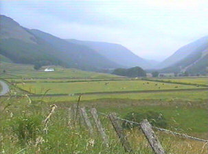 Scottish Borders, dans le sud de l'Ecosse